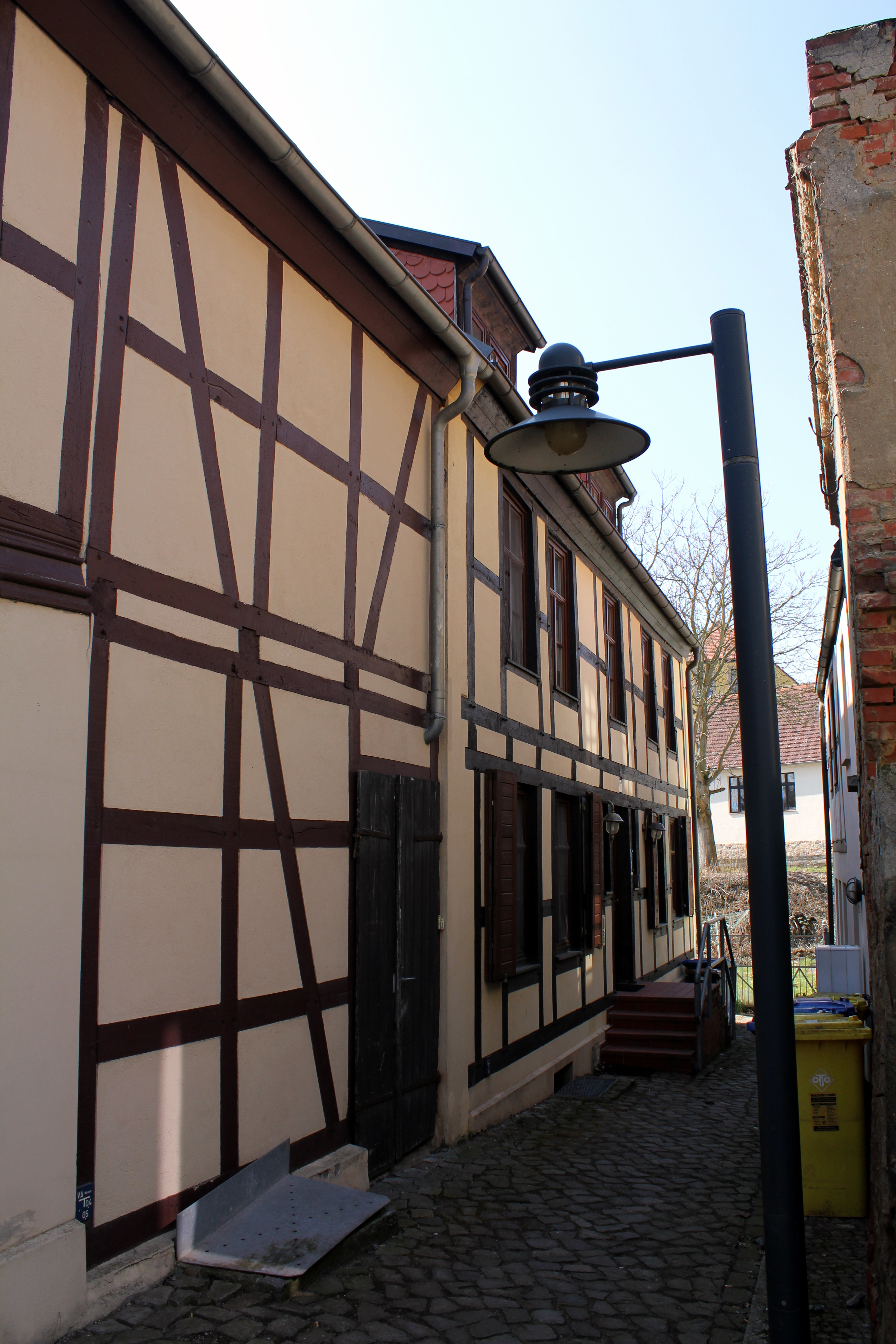 Wohnhaus,Fischerufer 22, Wolmirstedt